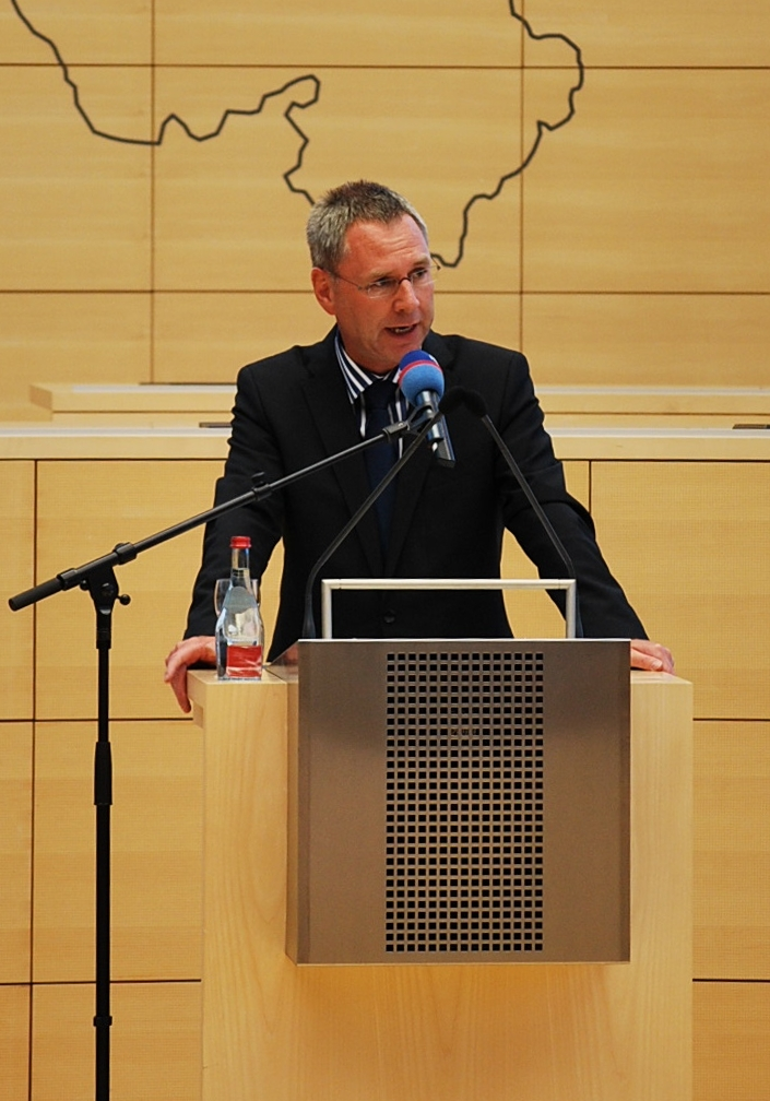 Landtagspräsident Dr. Torsten Geerdts begrüßt die Gäste im Plenarsaal